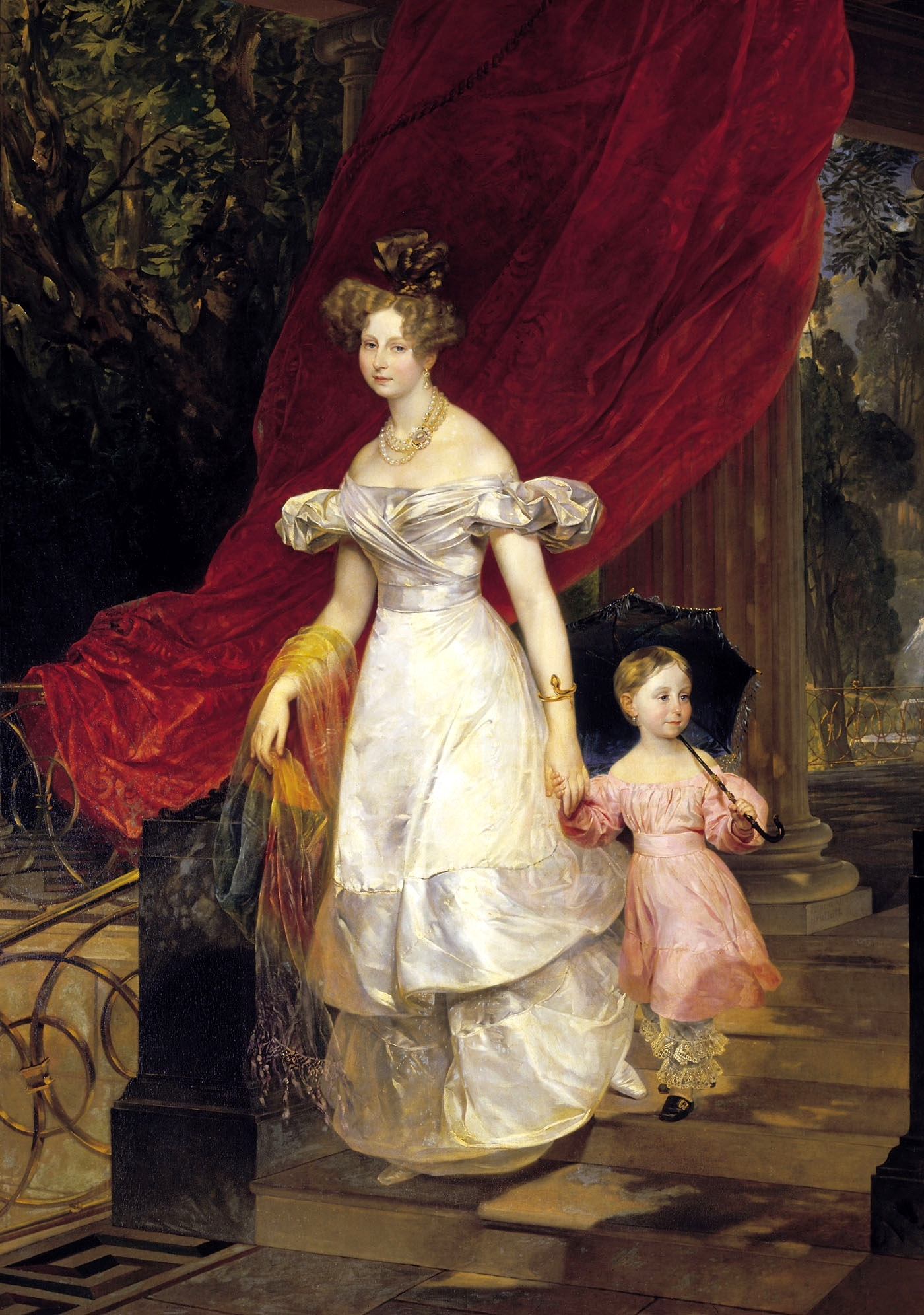 Portrait of Grand Duchess Elena Pavlovna with her daughterlabel QS:Len,"Portrait of Grand Duchess Elena Pavlovna with her daughter" label QS:Lru,"Портрет великой княгини Елены Павловны с дочерью Марией, Государственный Русский музей, Санкт-Петербург, Россия"